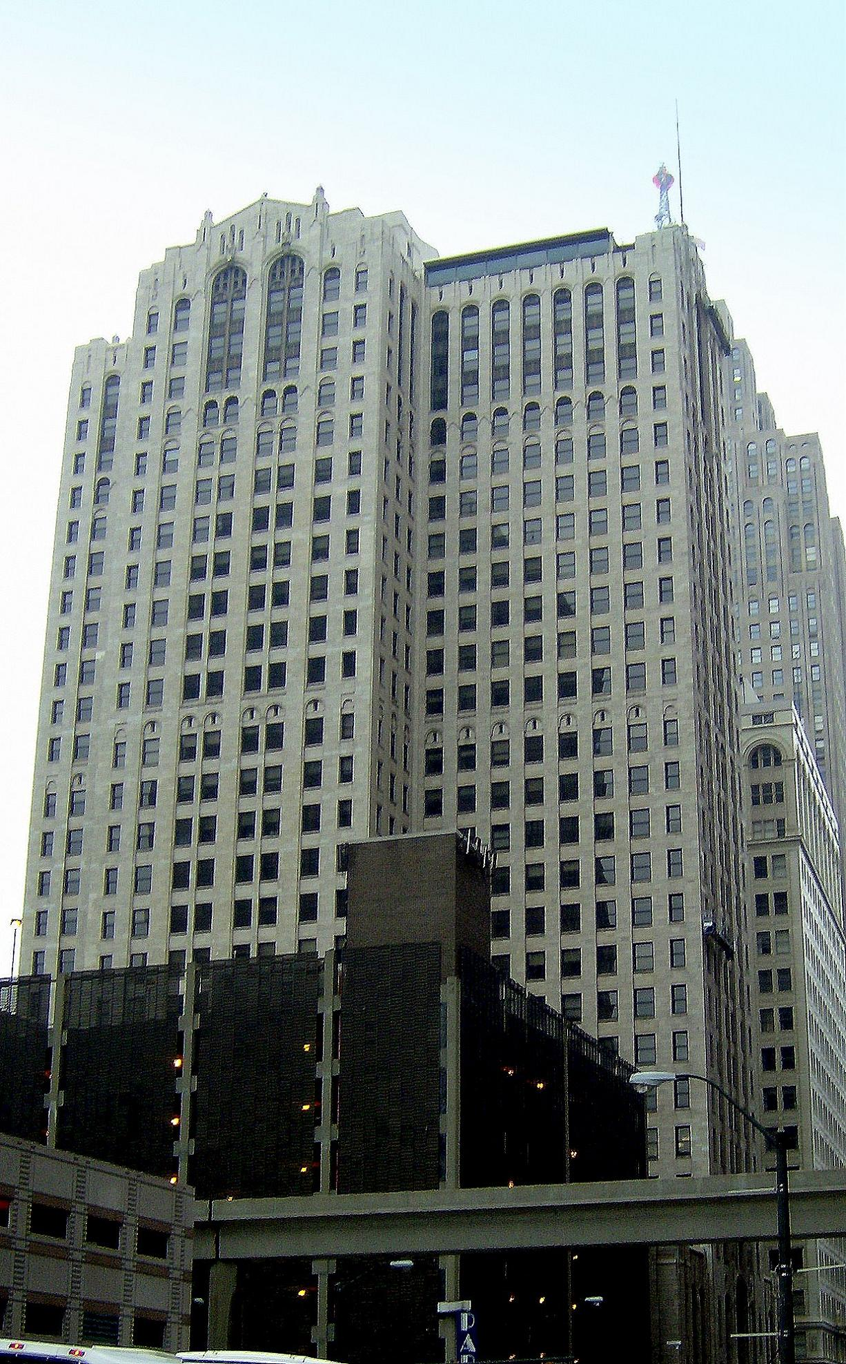 Buhl Building in Detroit, Michigan